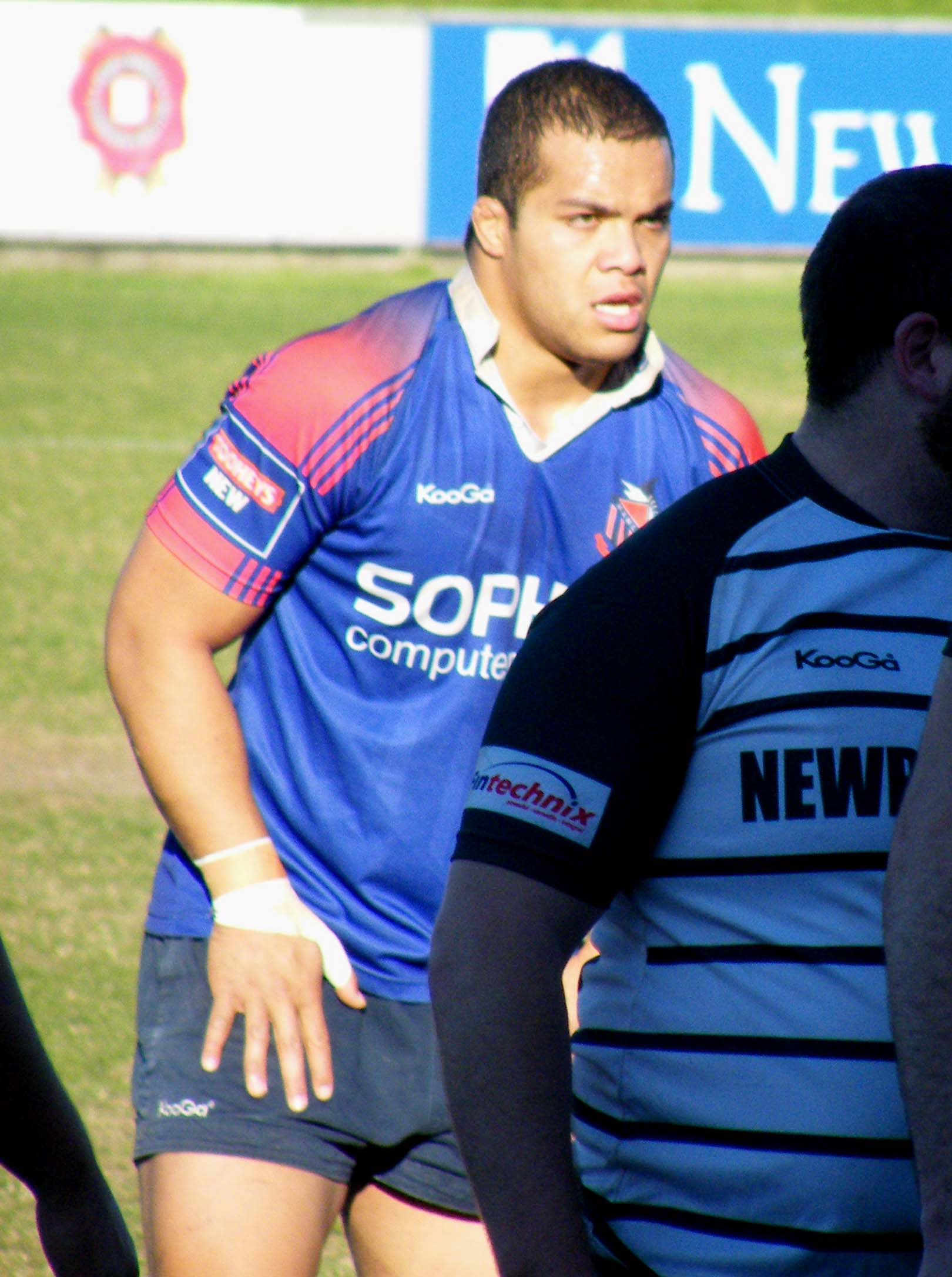 Eddie Aholelei of Manly RUFC